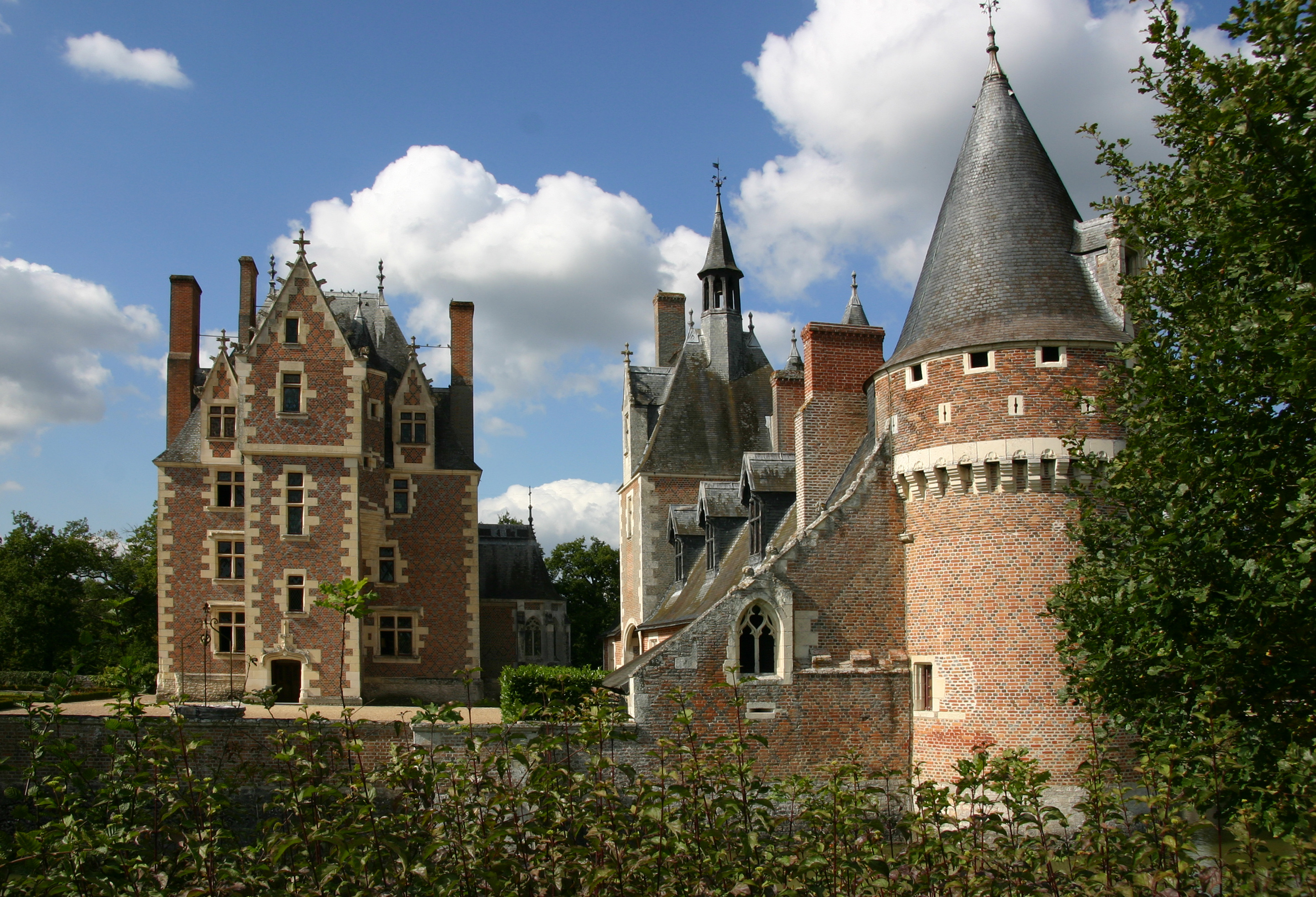 Schloss Le Moulin